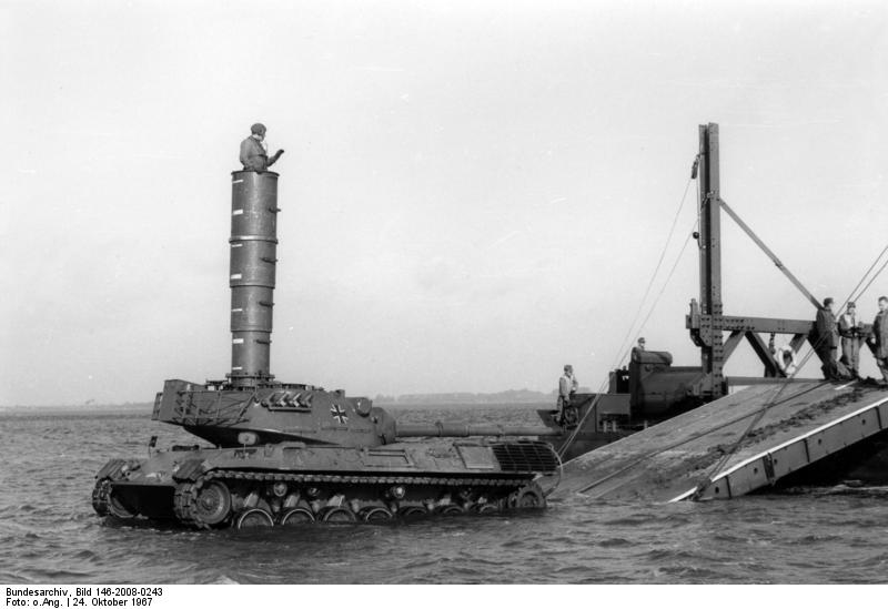 Leo-Erprobung 1967/1968, Kieler-Förde, sPiBtl 718 [schweres Pionier Bataillon 718], sSchwBrKp 721 [schwere Schwimmbrückenkompanie 721] 24. Oktober 1967